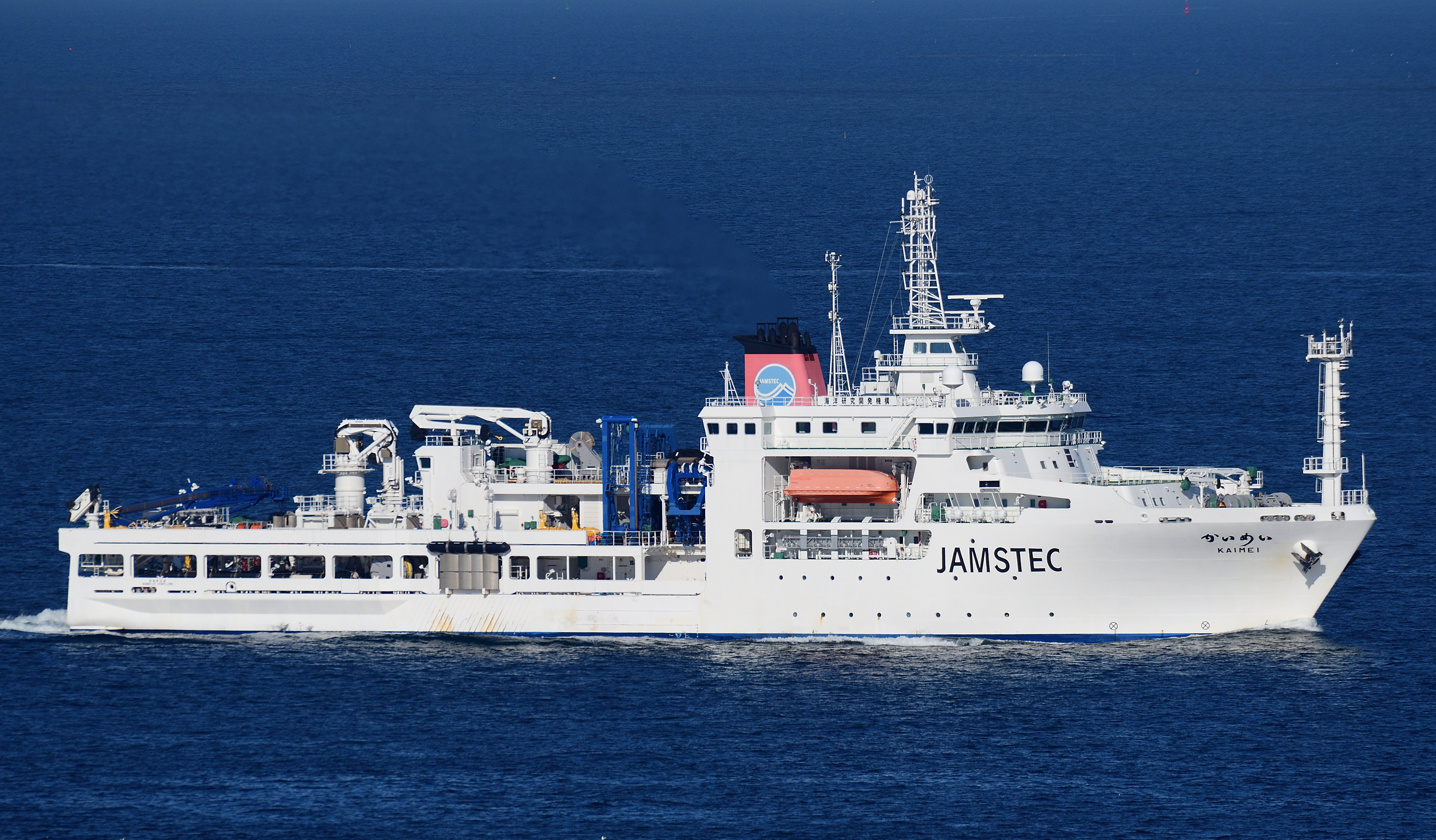 東京湾を航行するJAMSTECの海底広域研究船「かいめい」。